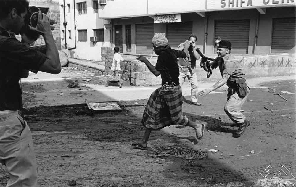 اعتقال المتظاهرين عدن 1966